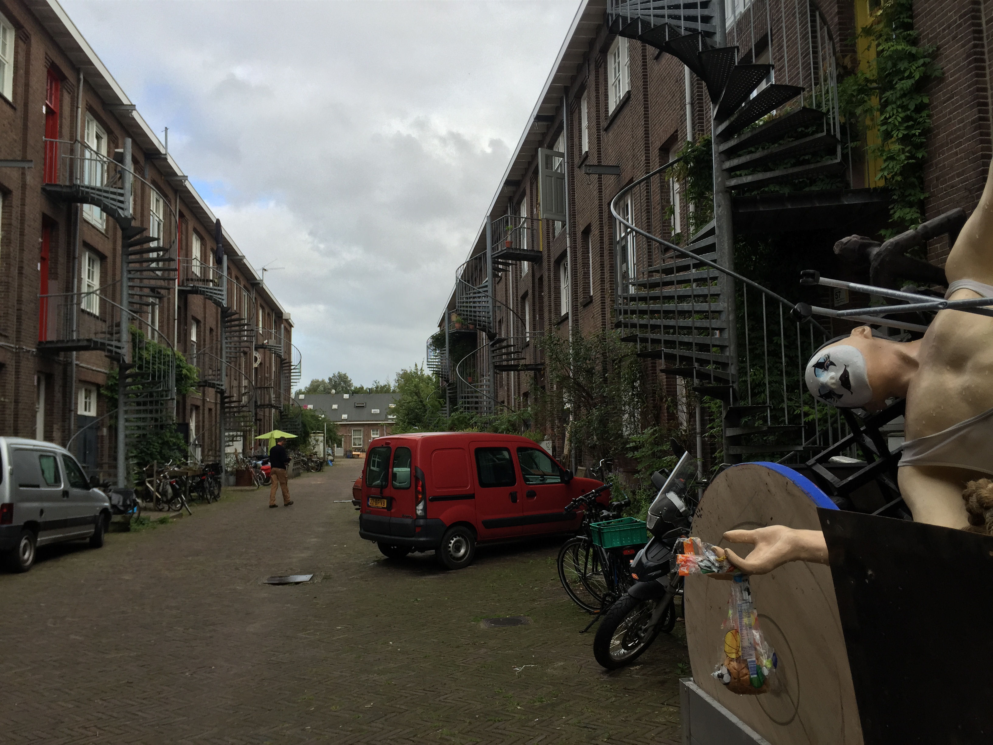 De middenstraat van het complex Nieuw en Meer, een voormalige militaire installatie aan het Nieuwe Meer in Amsterdam. September 2015